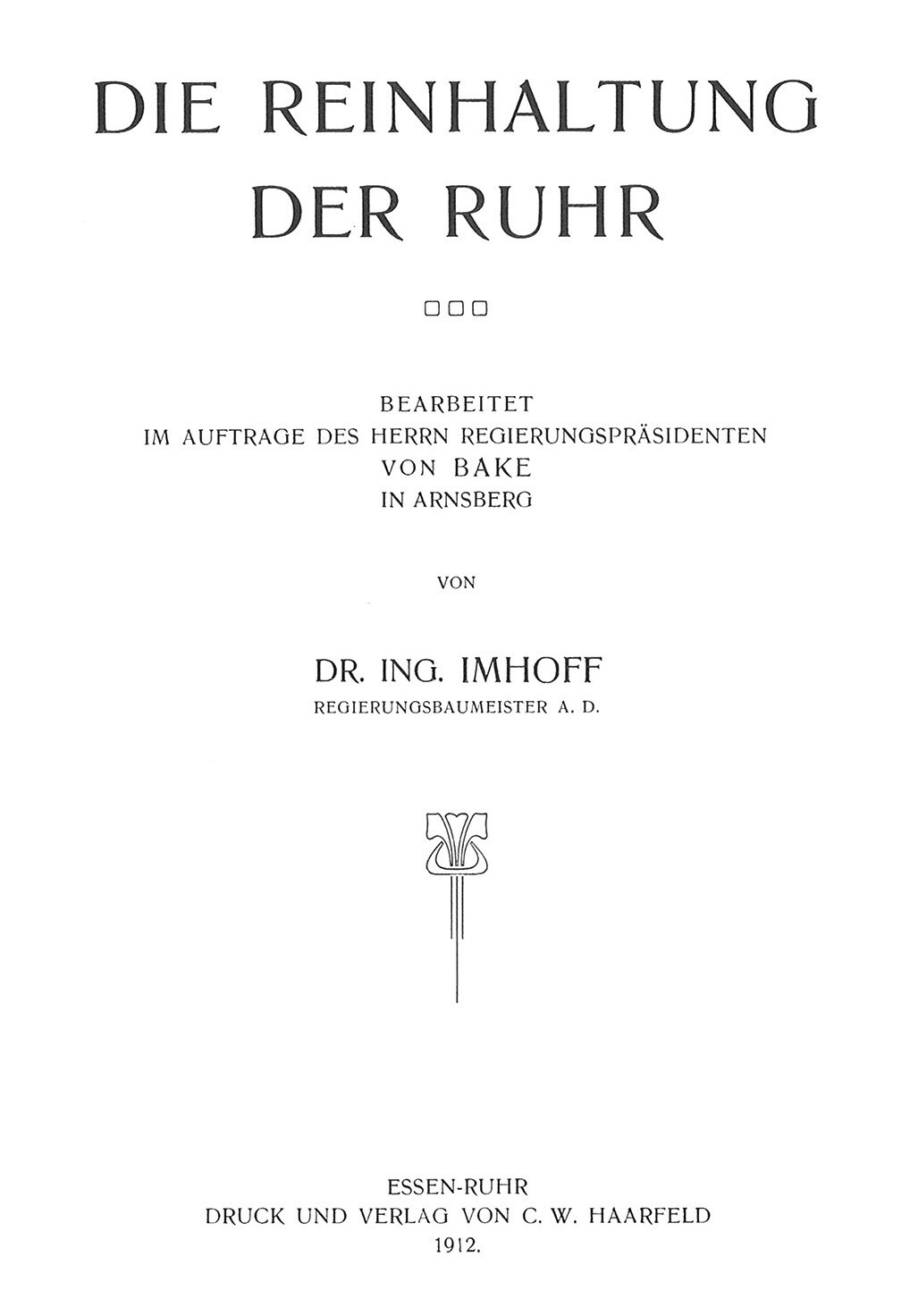 Titelseite der Broschüre „Die Reinhaltung der Ruhr“